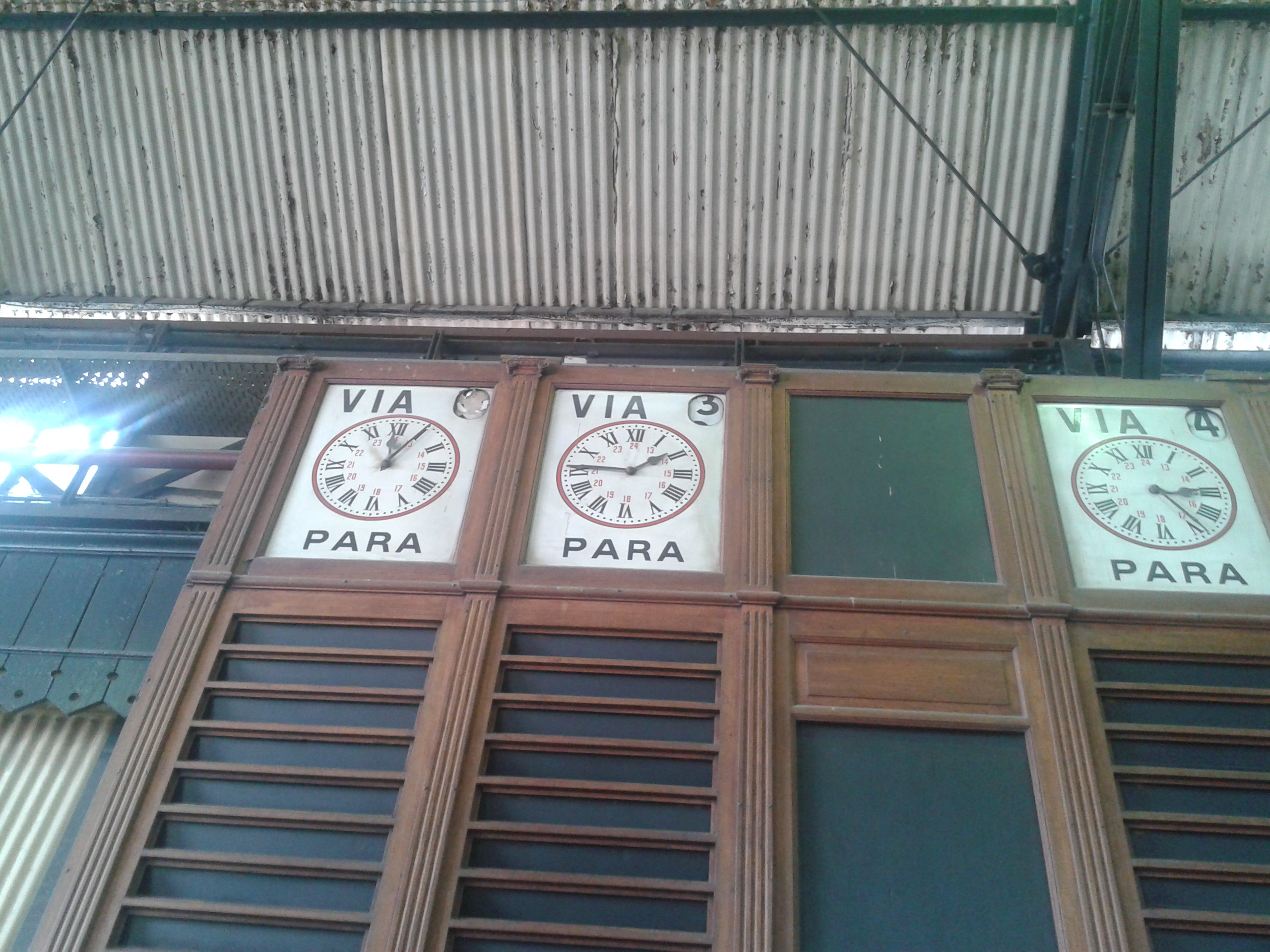 Viejo tablero de madera